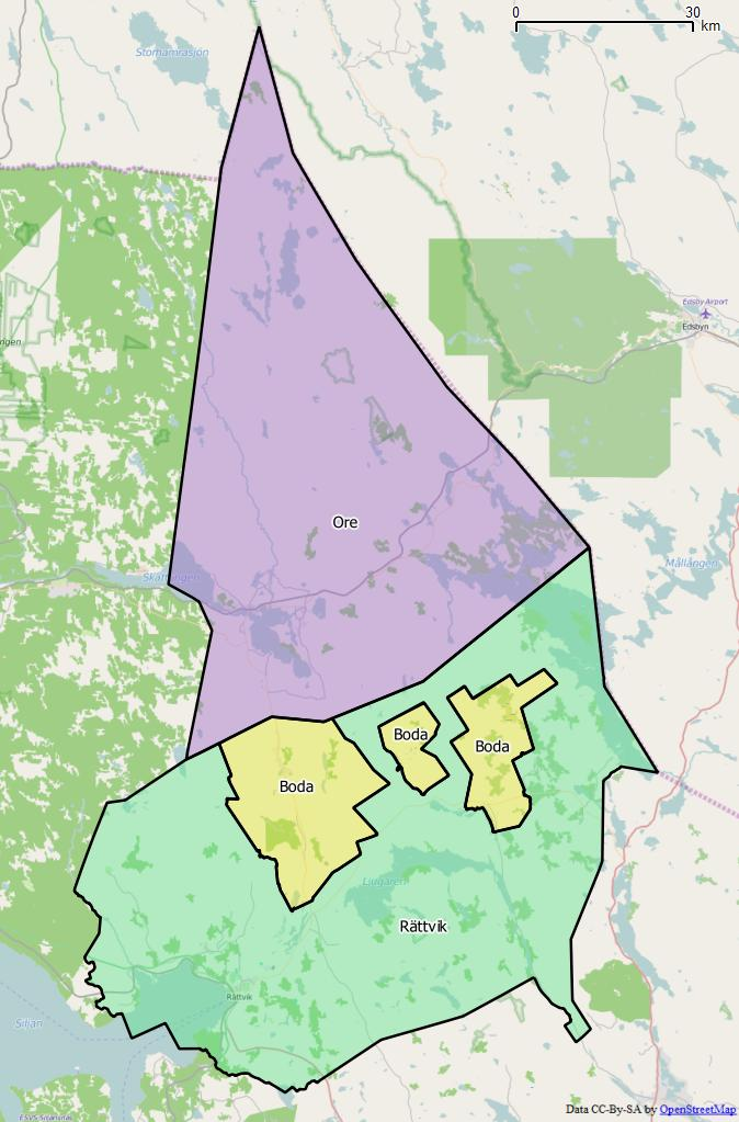 Distriktsindelningen i Rättviks kommun World file: 186.31037500694409914 0 0 -186.31037500694409914 1642915.10518067982047796 8768386.09026721306145191